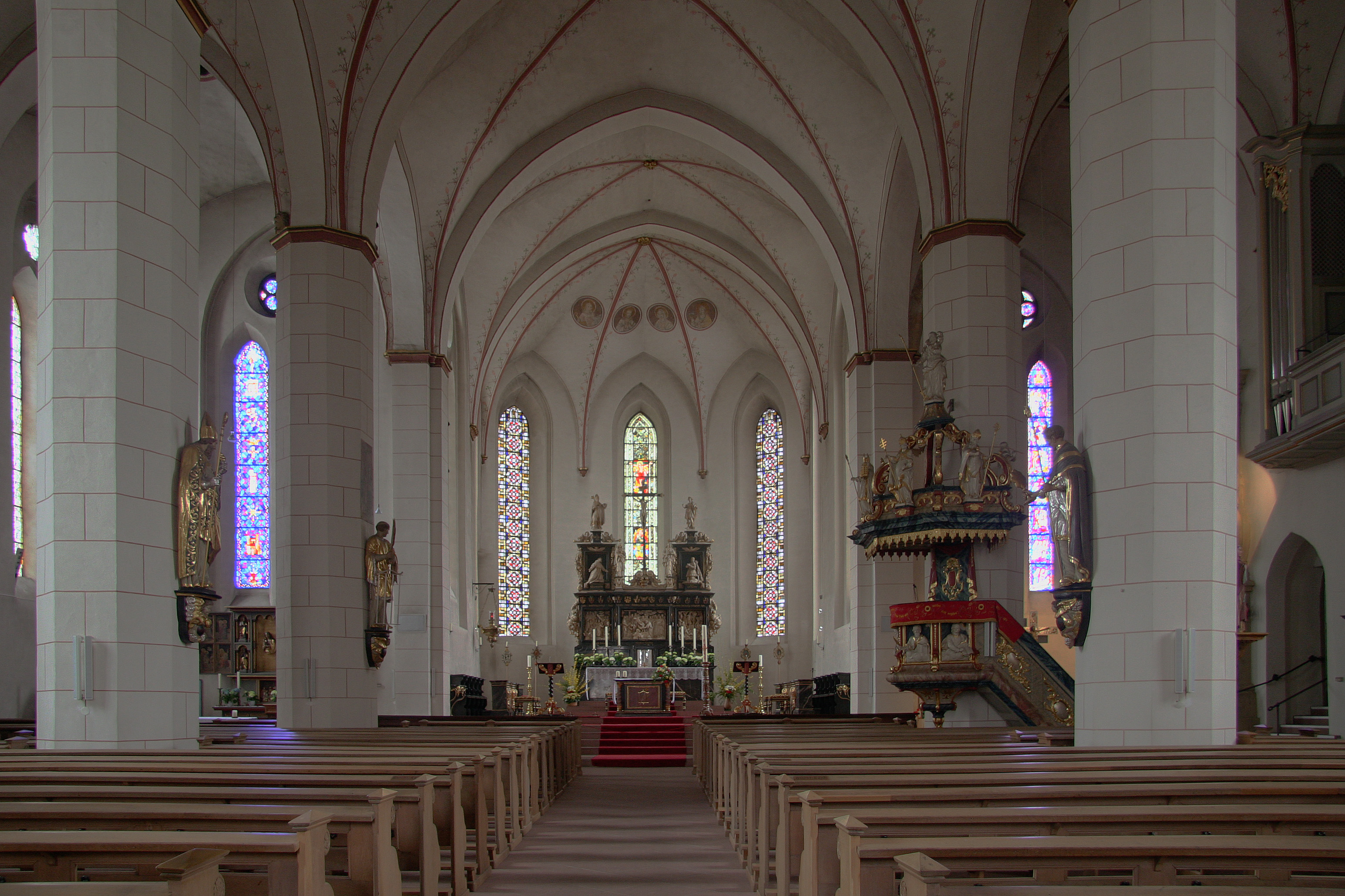 Innenraum der Propsteikirche St. Laurentius in Arnsberg